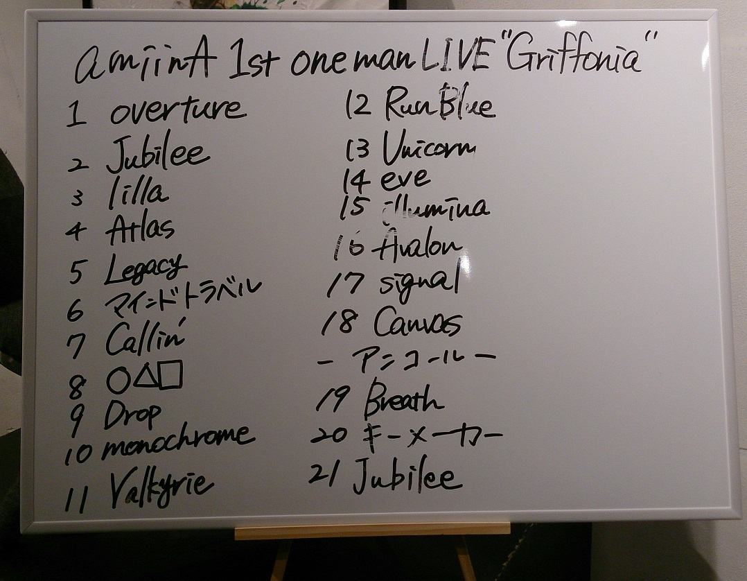 amiinAセトリボード(20180527(1))